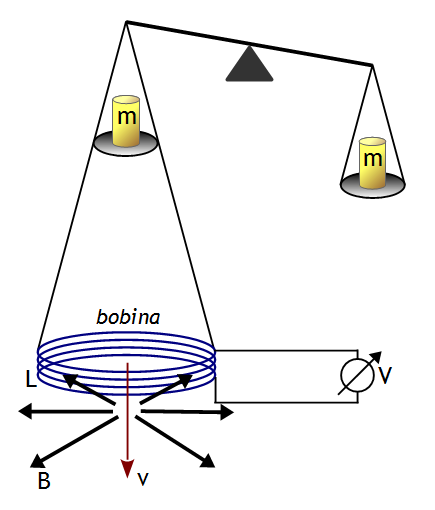 Balança de watt en la configuració de moviment